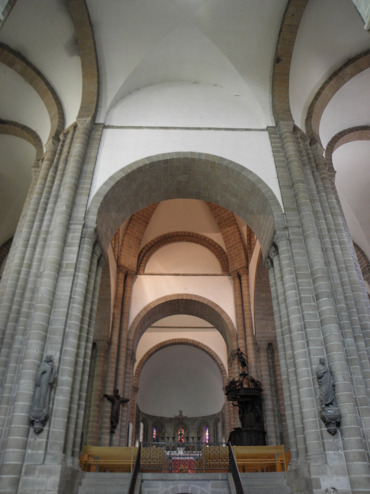 Vue vers l'orient de l'intérieur de l'abbatiale Sainte-Croix de Quimperlé (29). .